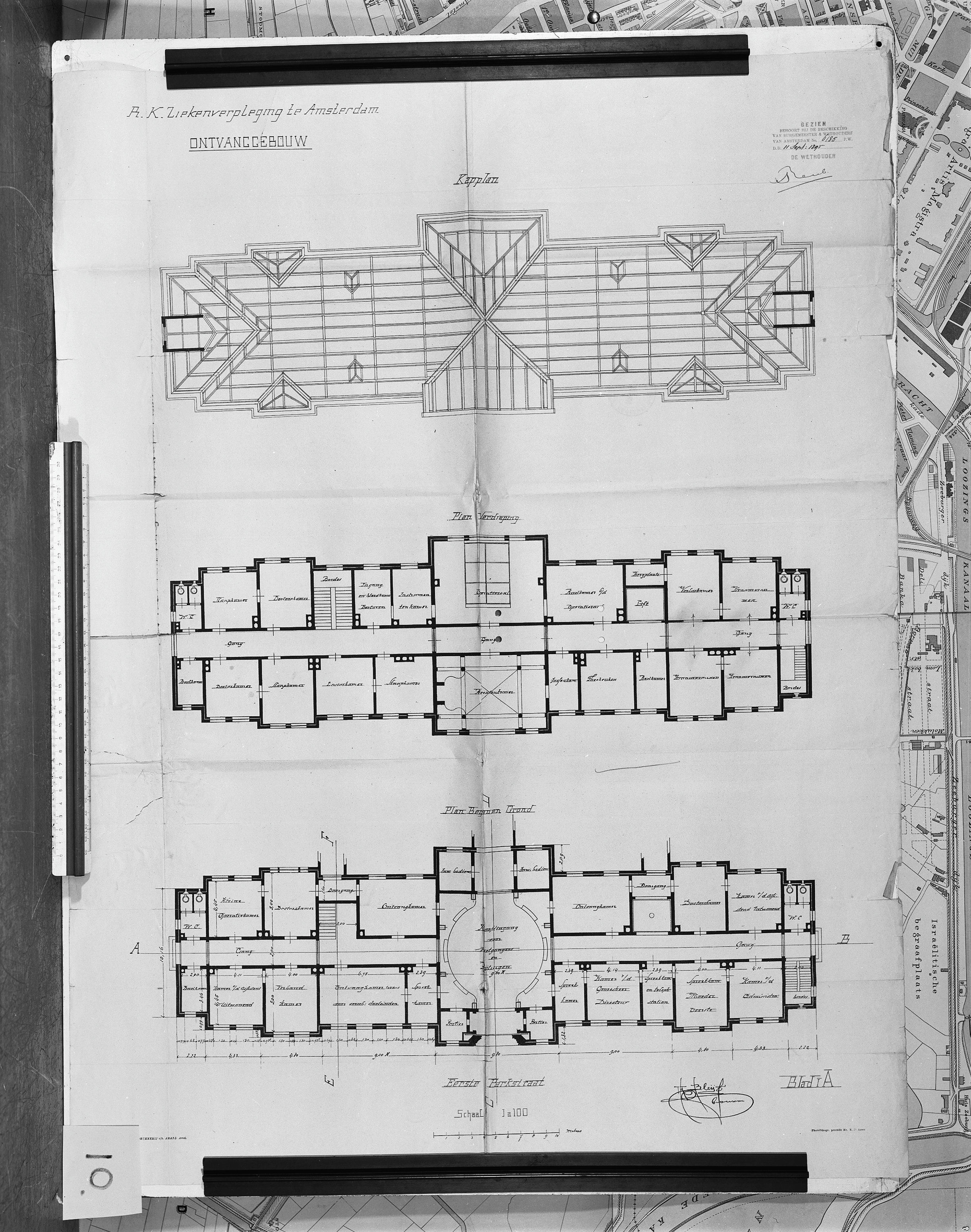 O.L.Vr. Gasthuis: ontwerp tekening Bleys 1895 ontvanggebouw